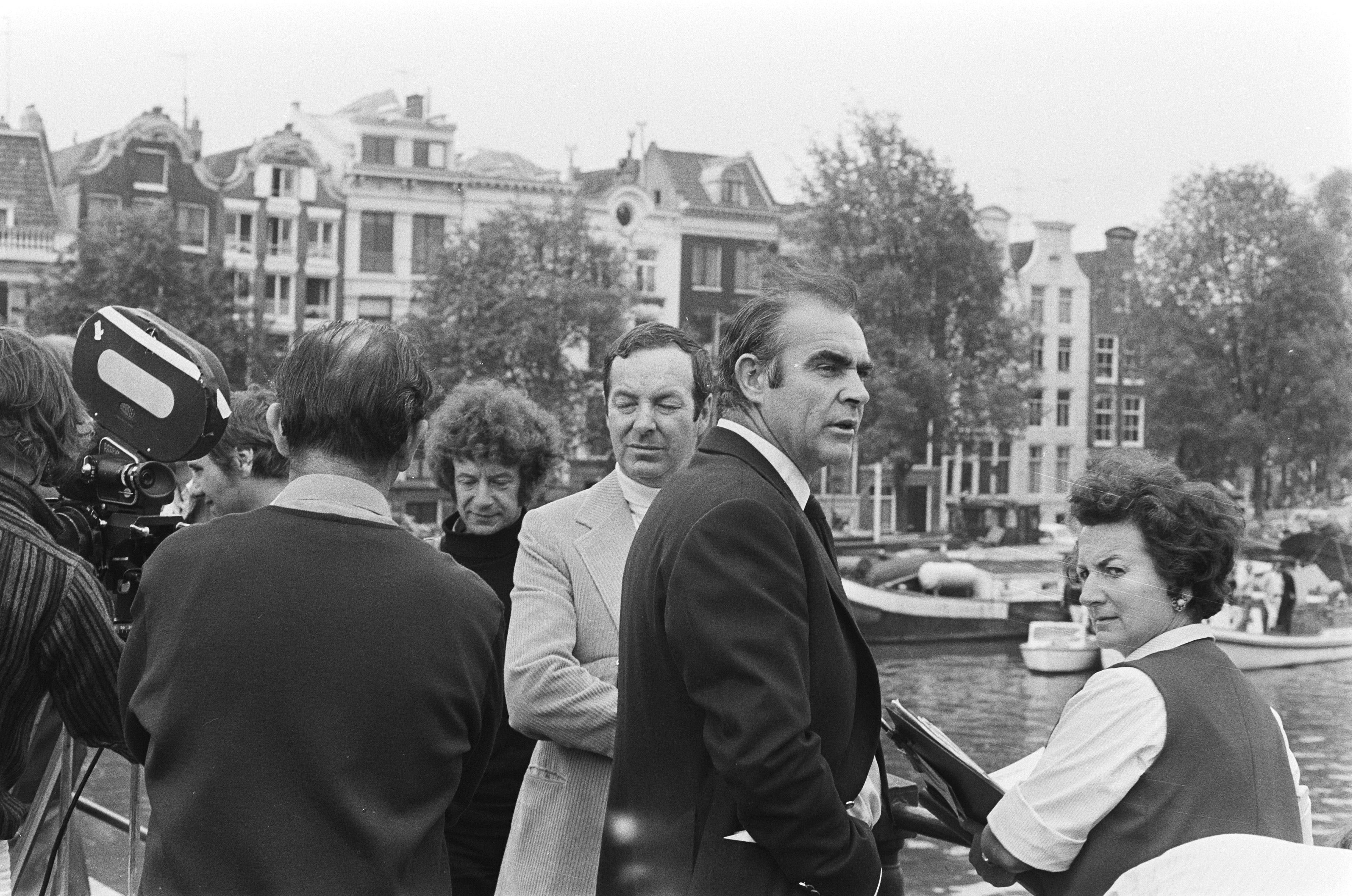 Sean Connery bei den Dreharbeiten für den James-Bond-Film Diamantenfieber in Amsterdam.